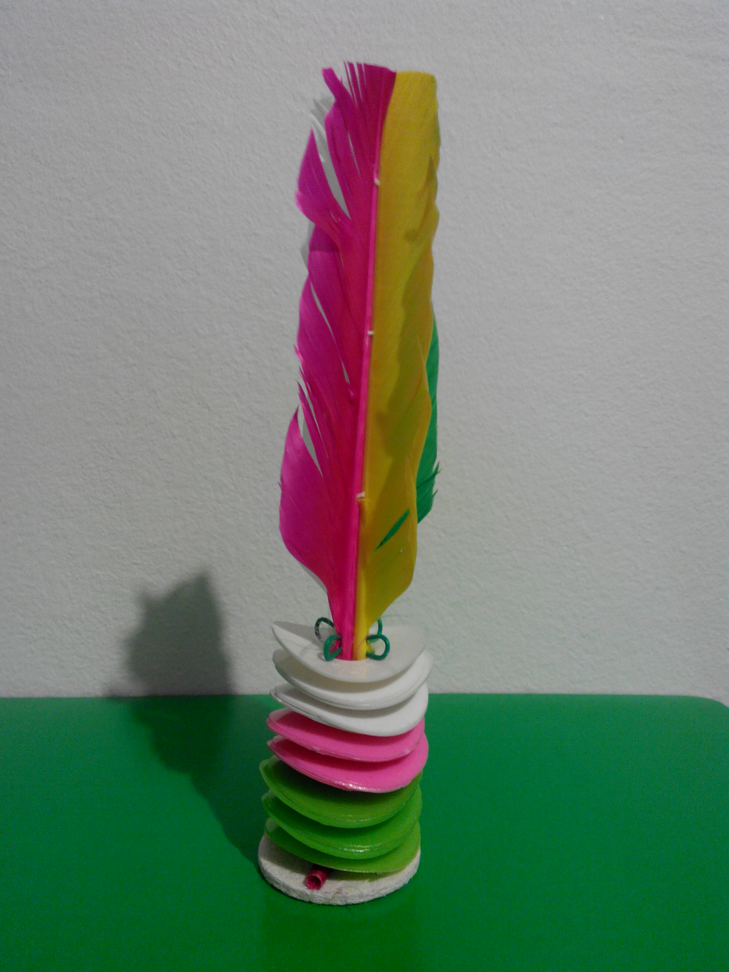 Jianzi pro všechny bez omezení prostoru či věku.